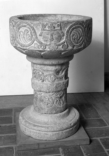 Dopfunt, från 1225-1250. Kategori: (04) DopfuntarDopfunt, från 1225-1250.